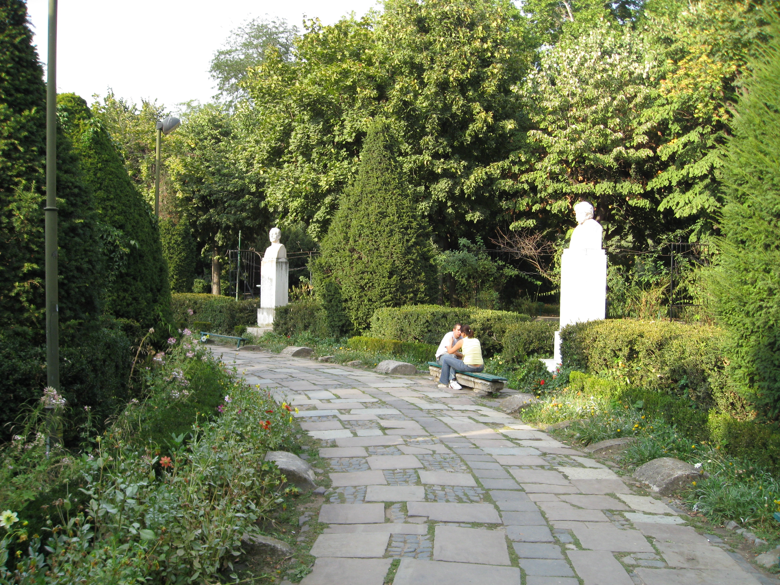 Rondul român, Cişmigiu, Bucharest, Romania